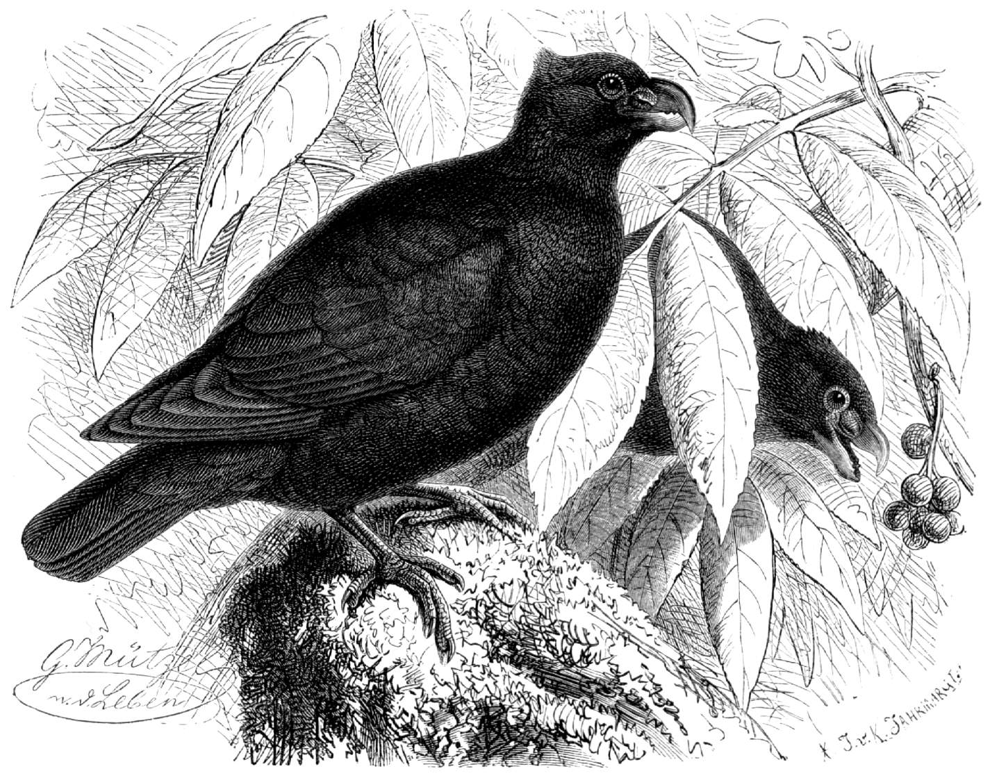 Tooth-billed Pigeon from Brehms Thierleben. Allgemeine Kunde des Thierreichs, Sechster Band, Zweite Abtheilung: Vögel, Dritter Band: Scharrvögel, Kurzflügler, Stelzvögel, Zahnschnäbler, Seeflieger, Ruderfüßler, Taucher. Leipzig: Verlag des Bibliographischen Instituts, 1882., S. 1.